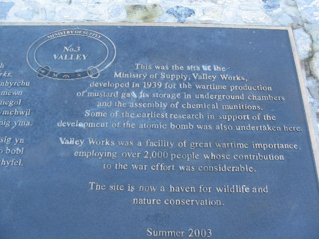 Valley Works, Rhydymwyn